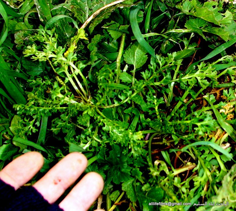 نباتات برّية سورية تؤكل